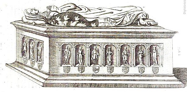 Tombeau de Jeannne de Brabant de l'église des Carmes à Bruxelles.